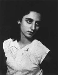 A young Fairuz.